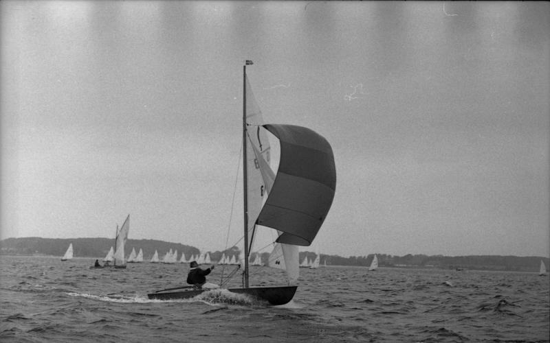 Kieler Woche 1962 20.-24.6.1962